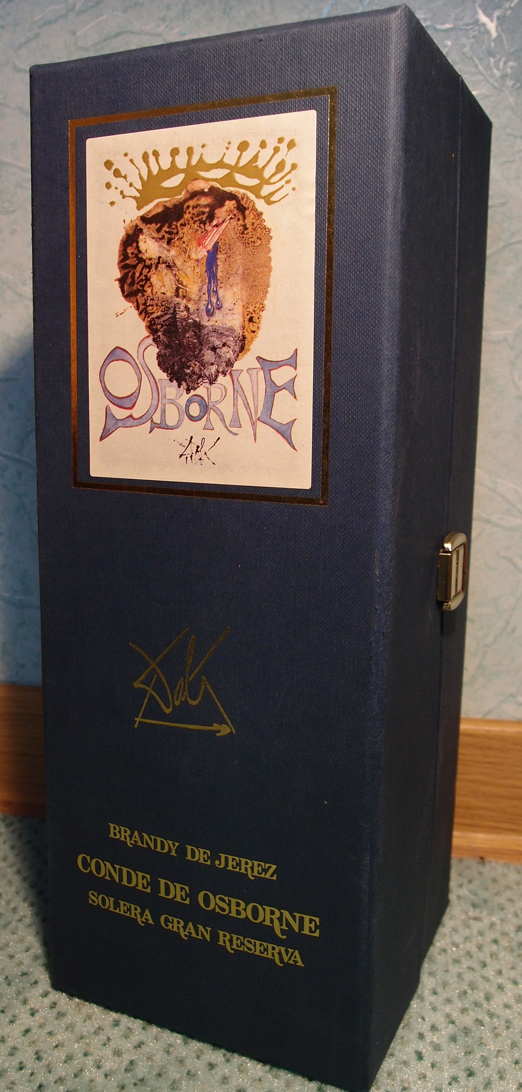 Verpackungsbox des Brandys "Conde de Osborne Dalí" (Solera Gran Reserva) Datum: 13.08.2011 Urheber: M. Pfeiffer alias Benutzer:Gordito1869 Quelle: privates Fotoarchiv des Urhebers